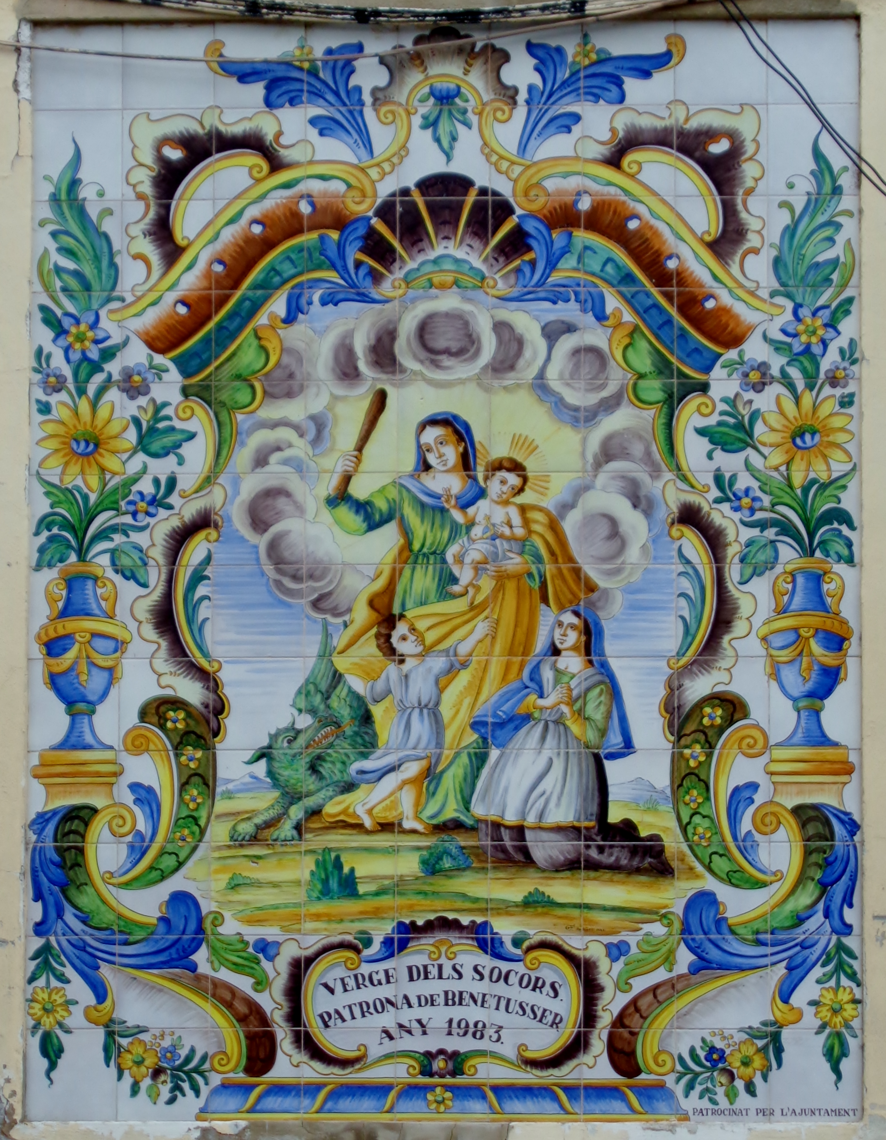 Benetússer.